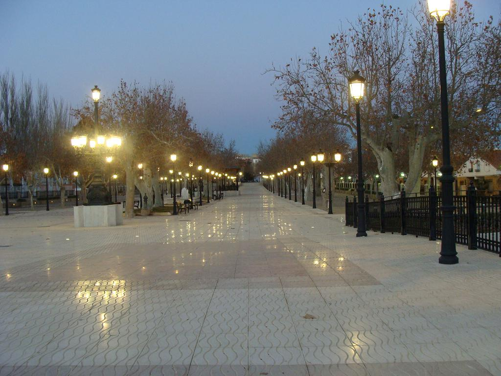 Utiel. Paseo a la salida de Utiel y que termina en el lugar conocido como El Tollo, junto al río Magro. Esta avenida es conocida con el nombre de Calle de los Héroes del Tollo.